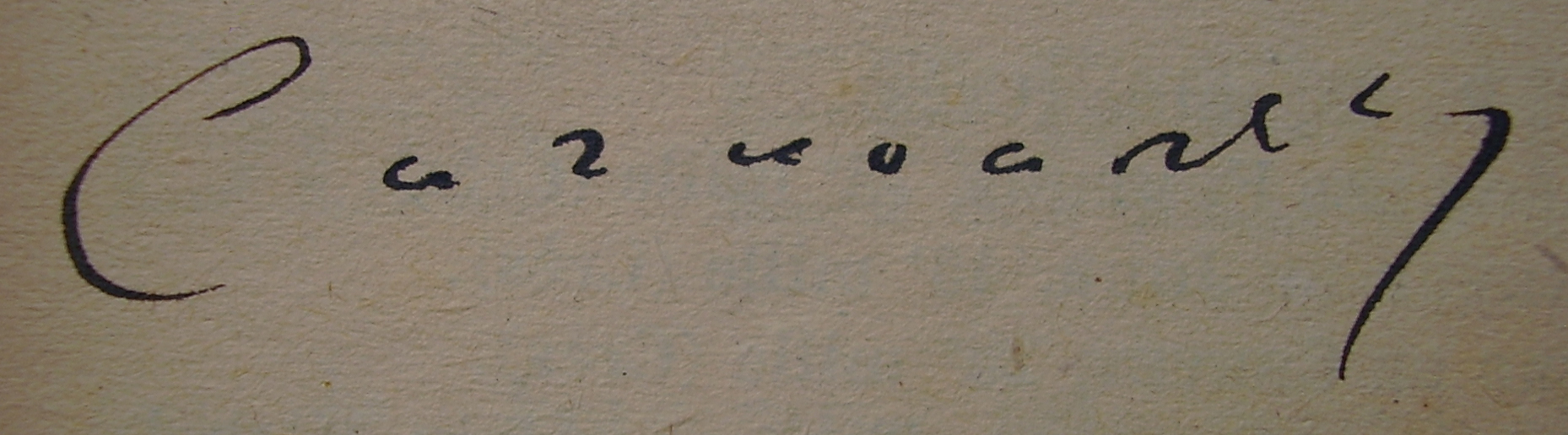 Signature de Curnonsky